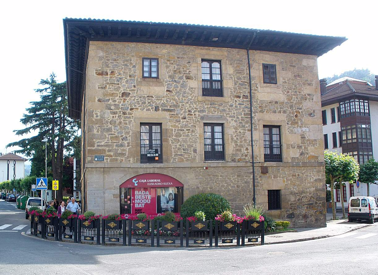 Aretxabaleta (Gipuzkoa)